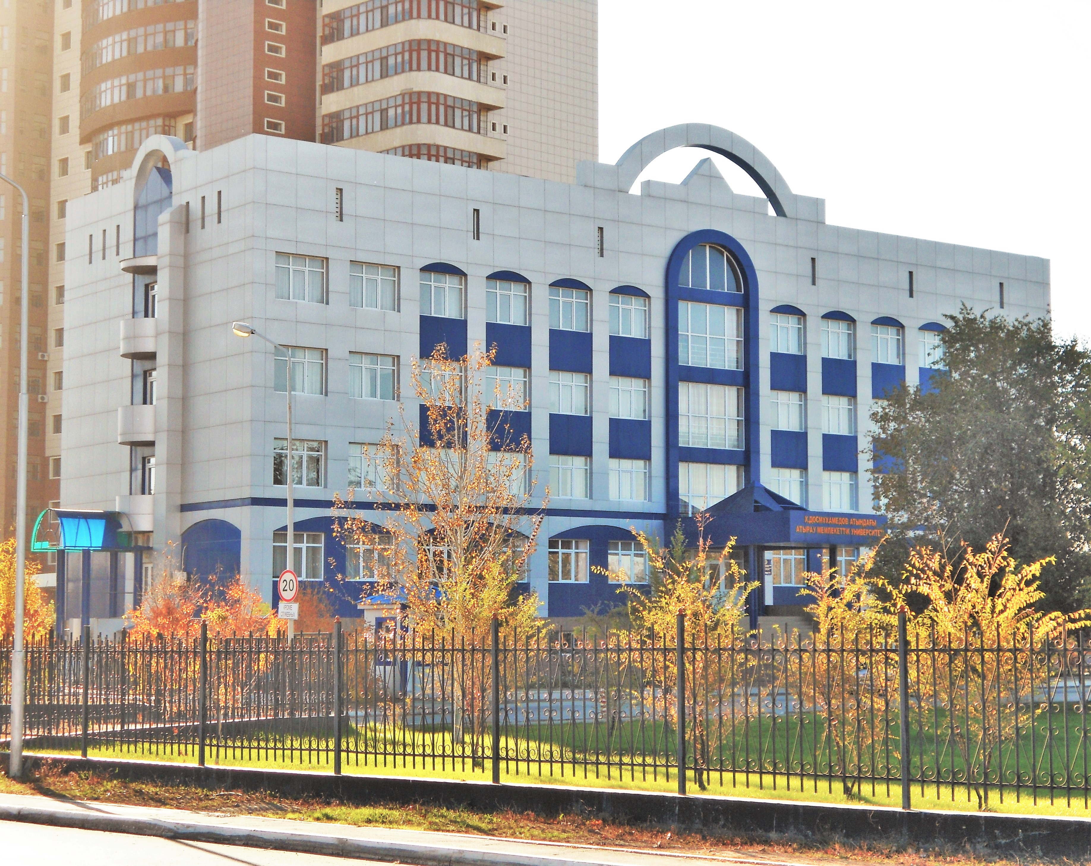 Атырау университеті